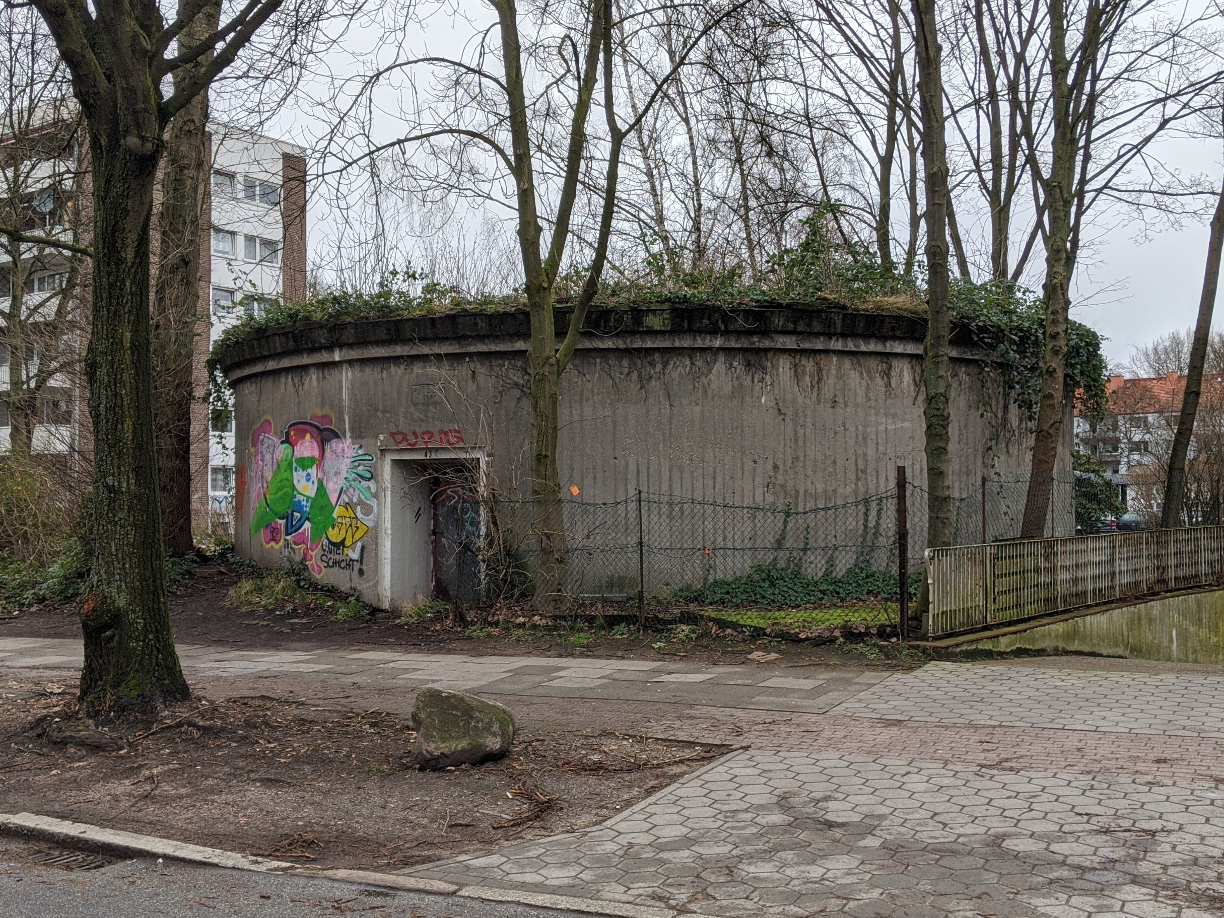 Rundbunker Bauerberg/Am Gojenbohm in Hamburg-Horn, Vorderansicht vom Bauerberg